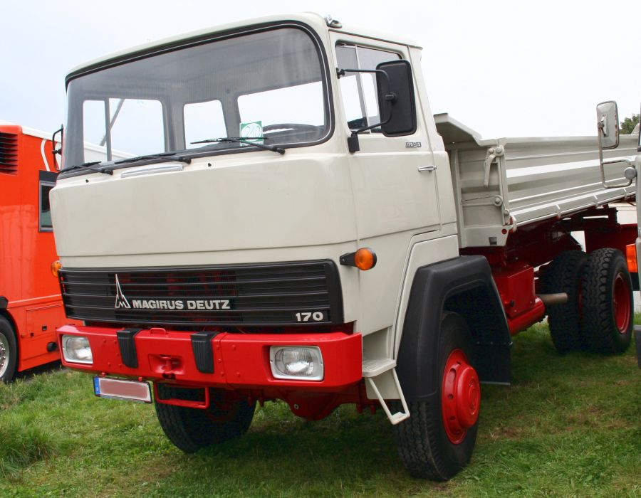 Magirus-Deutz 170, aufgenommen 2007 von C-C-Baxter